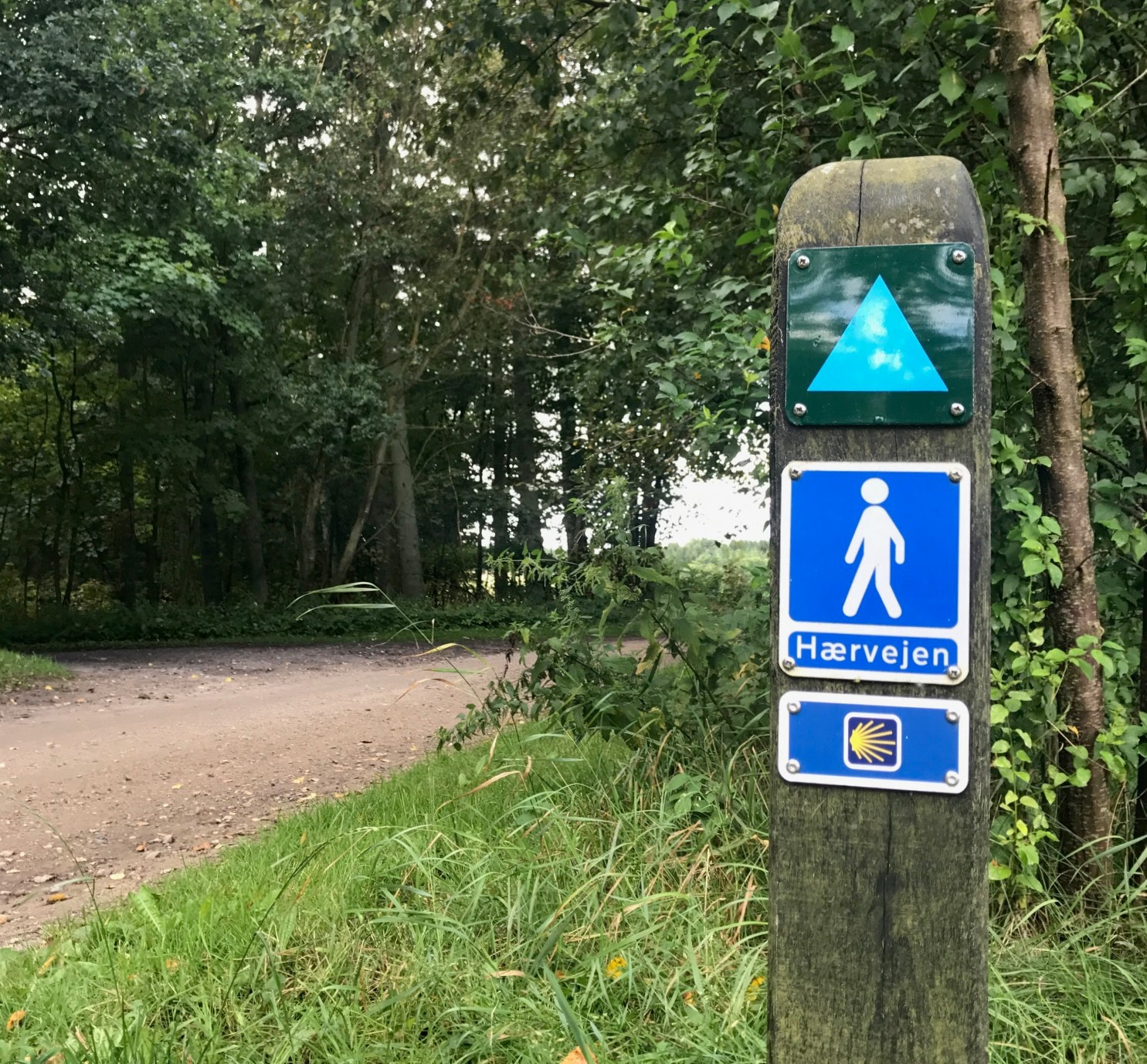 Signal for Haervejen and Camino de Santiago in Nørre Snede (Denmark)